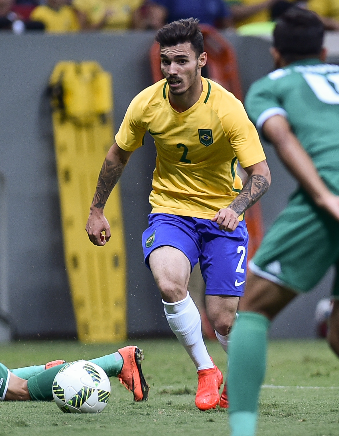 Estádio Nacional de Brasília Mané Garrincha, Brasília, DF, Brasil, 7/8/2016 Foto: Andre Borges/Agência Brasília. Brasil e Iraque jogam neste domingo (7), no Estádio Mané Garrincha, pelo grupo A do futebol masculino nas Olimpíadas 2016.